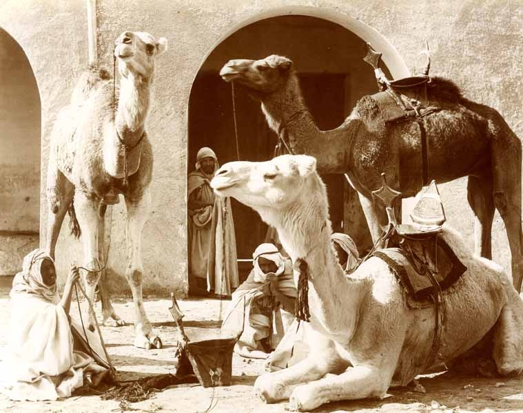 Meharas - Biskra